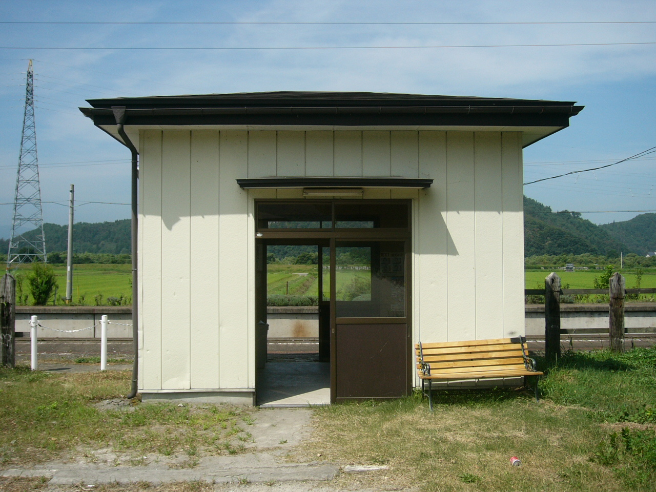 Monden Station